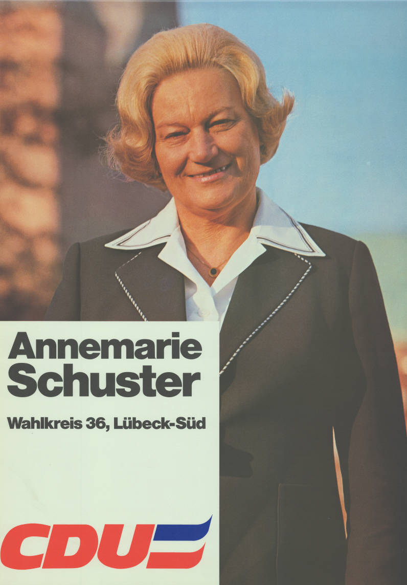 Annemarie Schuster Wahlkreis 36, Lübeck-Süd CDUAbbildung:FotoPlakatart:Kandidaten-/Personenplakat mit PorträtAuftraggeber:Verantw.: CDU Schleswig-Holstein Objekt-Signatur:10-012 : 445Bestand:Landtagswahlplakate Schleswig-Holstein (10-012)GliederungBestand10-18:Landtagswahlplakate Schleswig-Holstein (10-012) » Landtagswahl am 29.4.1979 » KandidatenplakateLizenz:KAS/ACDP 10-012 : 445 CC-BY-SA 3.0 DE